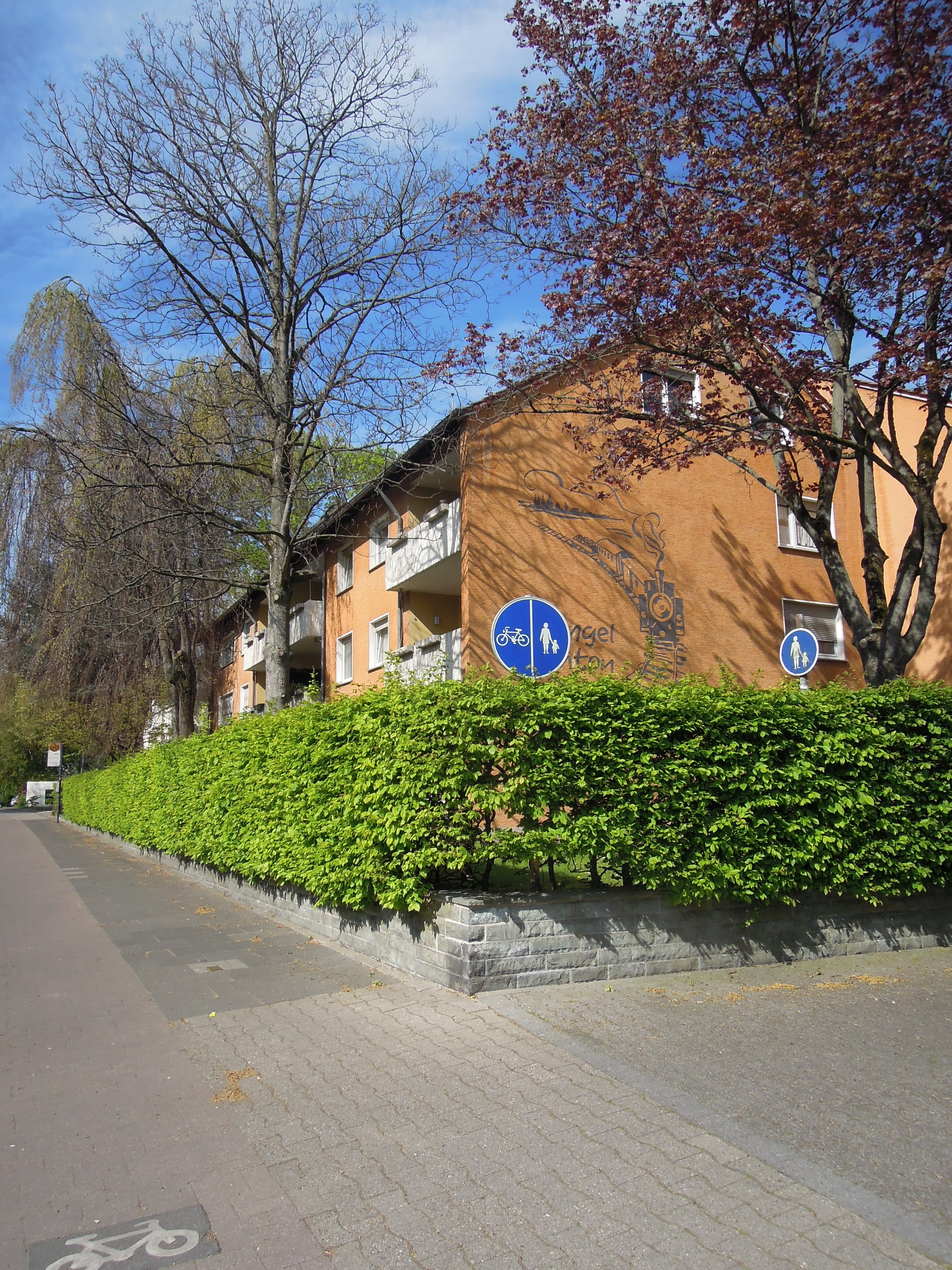 Stolpersteinlage Soest Westenhellweg 4